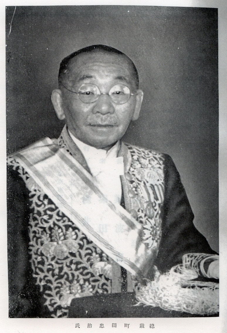 この写真は、立憲民政党第2代総裁の町田忠治（1863-1946）の写真です。